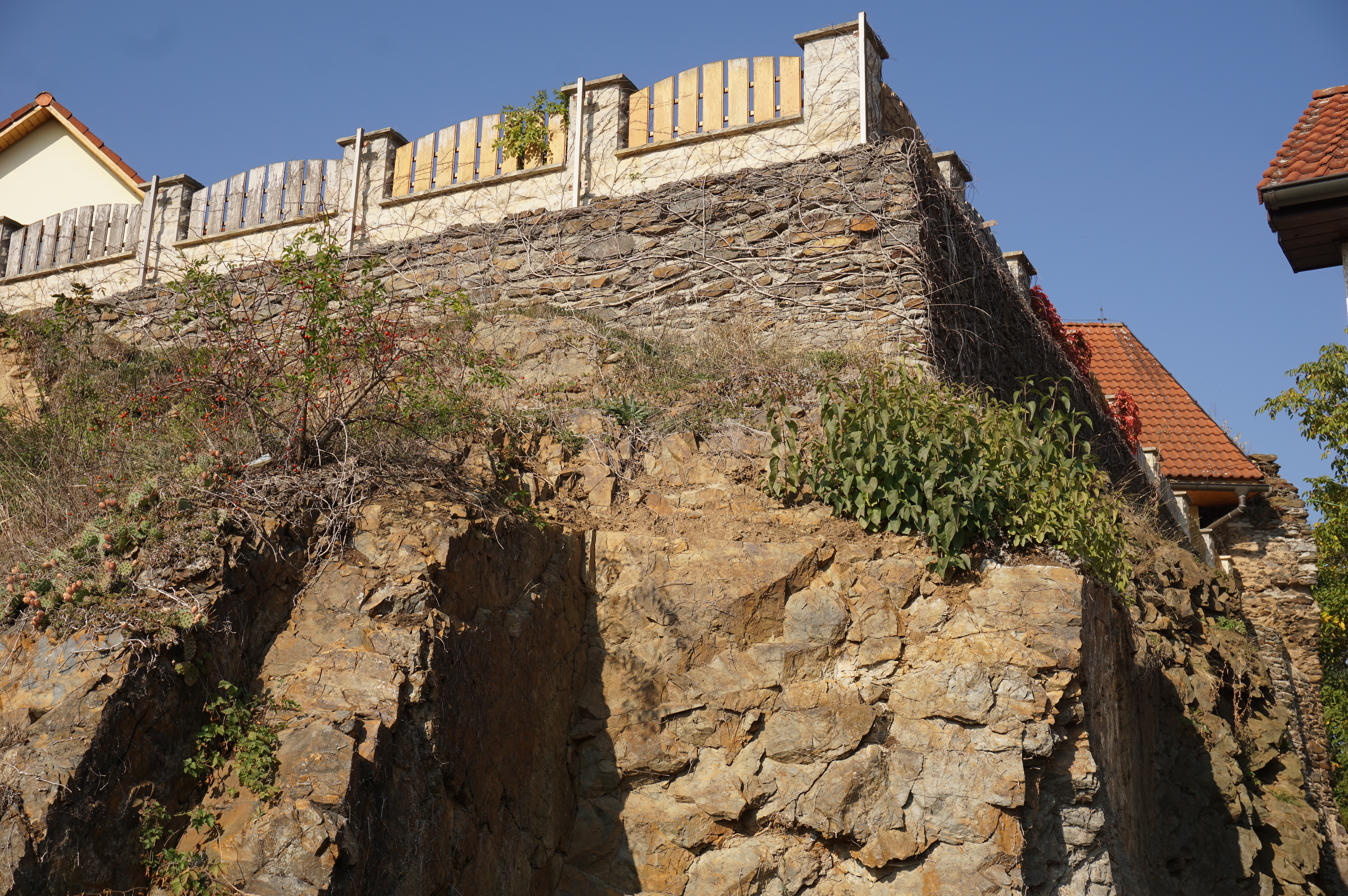 Hrad Květnice, Návrší jižně od Mlýnského rybníka, Květnice.